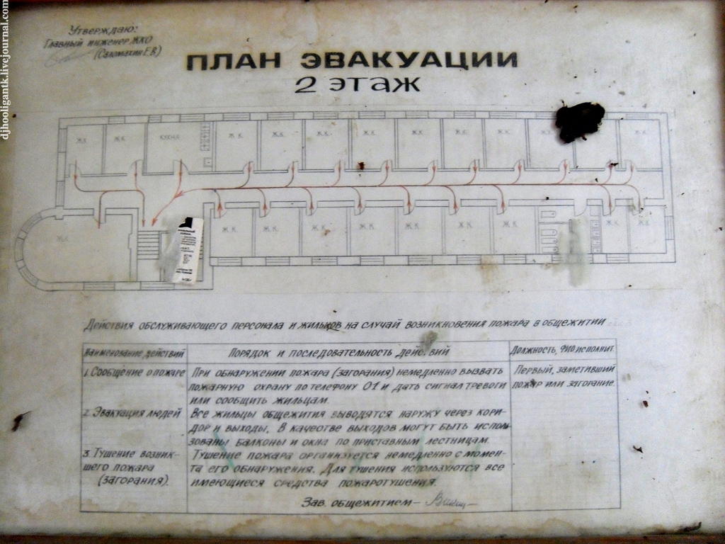 Секции СХИ план эвакуации 2 этажа